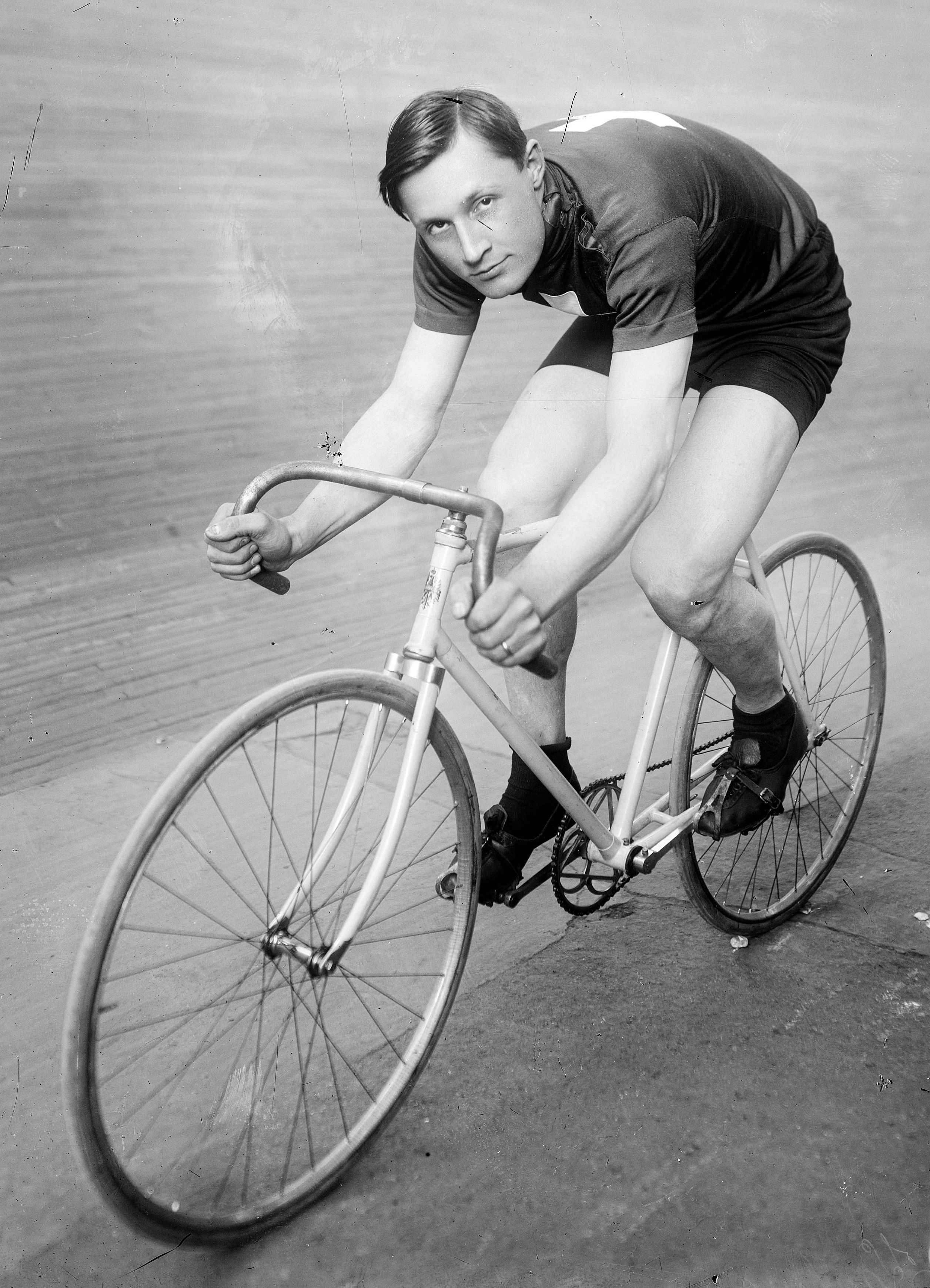 [Ernest] Kauffmann [coureur cycliste suisse participant au meeting de la Toussaint] : [photographie de presse] / [Agence Rol]